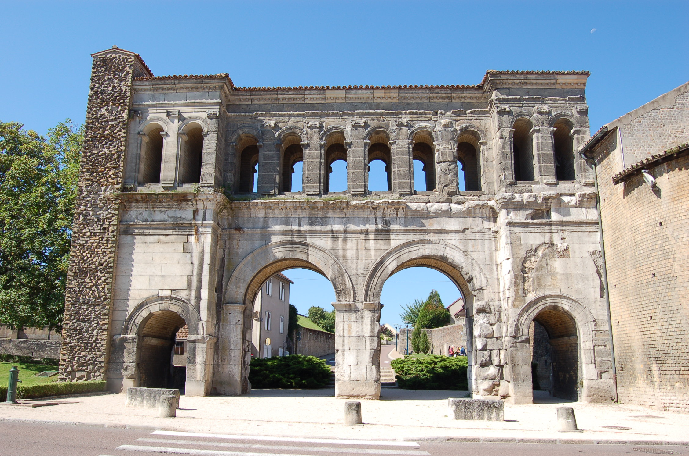 Porte de Saint André à Autun